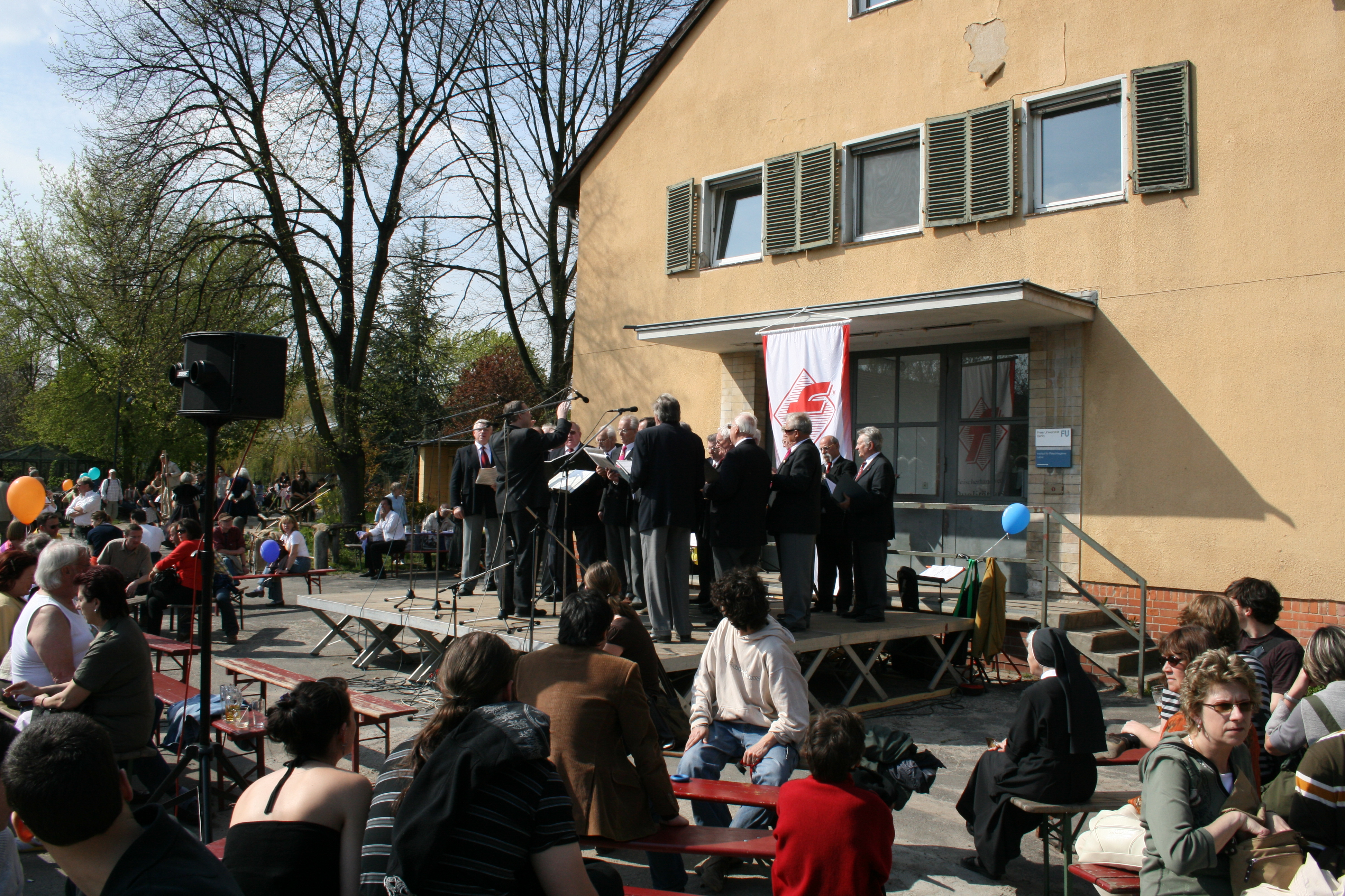 Berlin, Freilichtmuseum Domäne Dahlem, Berliner Bratwurstmeisterschaft: Auftritt des Chores der Berliner Fleischer-Innung.